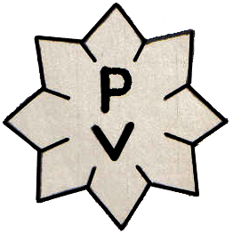 Logo usado por las Fuerzas Armadas Revolucionarias